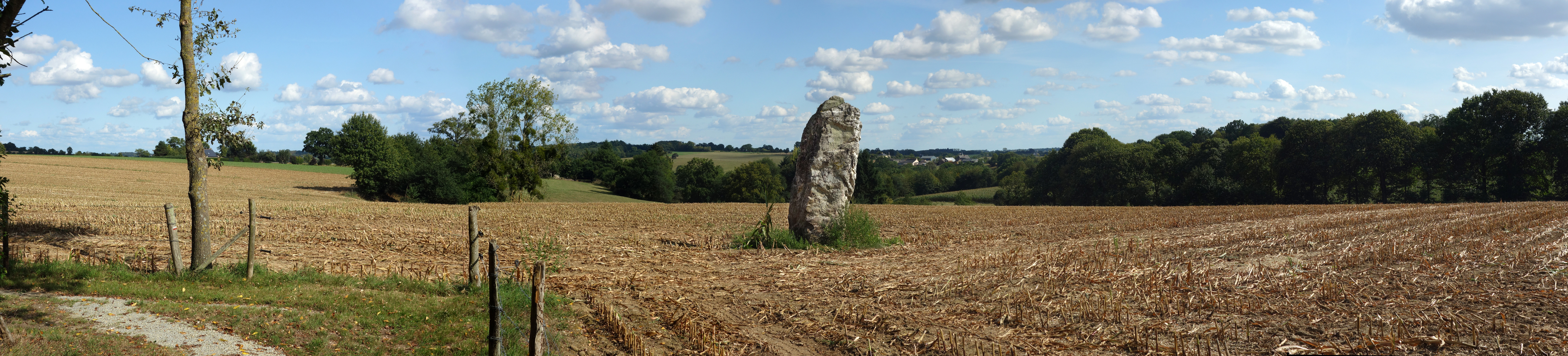 Un panoramique permettant de situer le mégalithe dans son environnement... Sur les hauteurs de la retenue de la Cantache, un jour d'été...